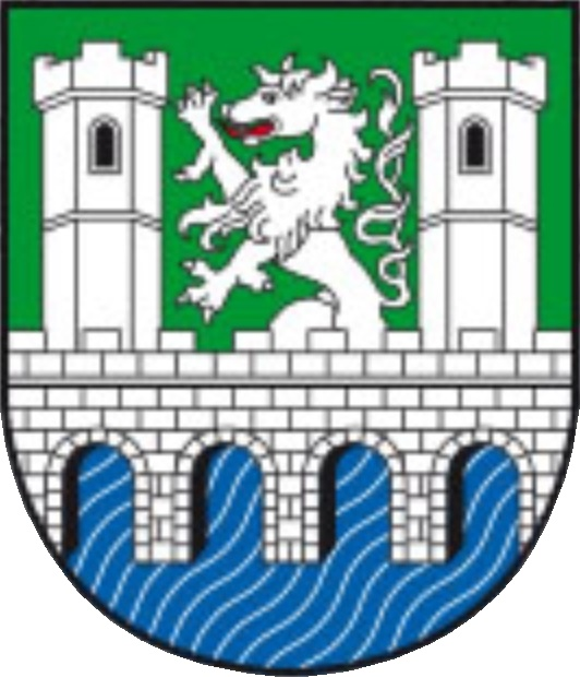 27. Verlautbarung der Steiermärkischen Landesregierung vom 11. Februar 2016 über die Verleihung des Rechtes zur Führung eines Gemeindewappens an die Stadtgemeinde Bruck an der Mur (politischer Bezirk Bruck-Mürzzuschlag)